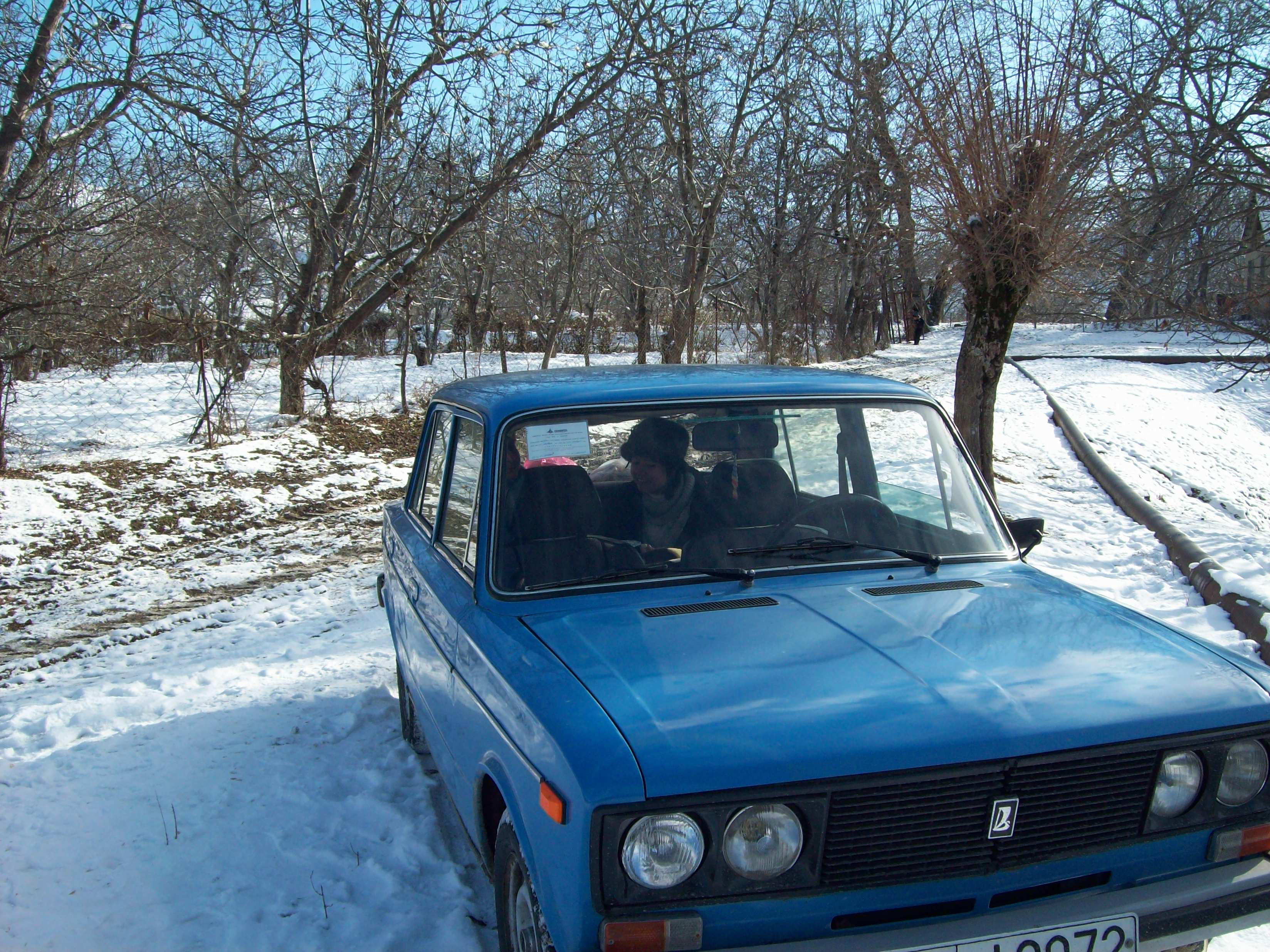 Советский автопром. ВАЗ 2106 1978 года выпуска (Ташкент, Узбекистан)